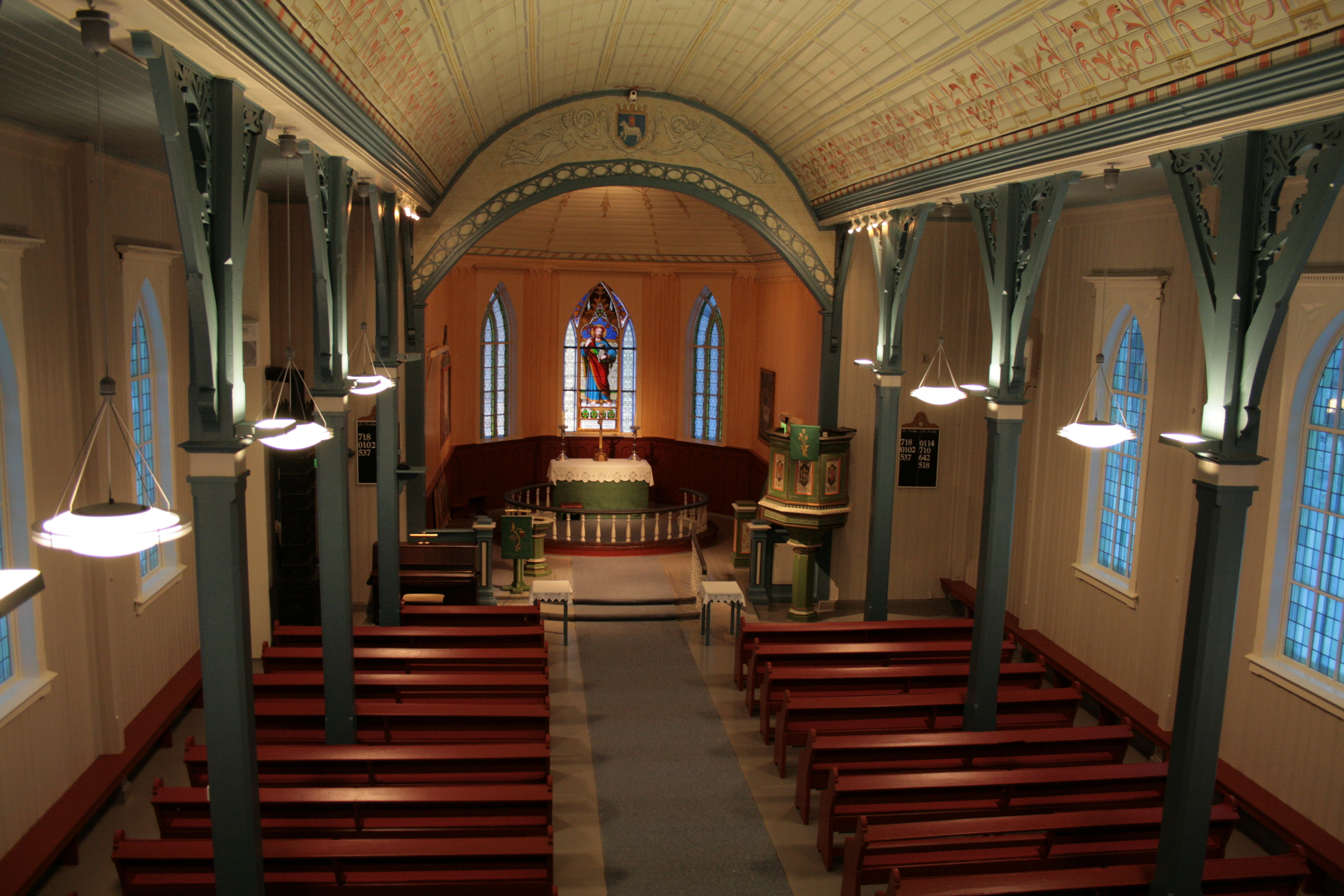 Inni Hemsedal kirke, som ligger i Hemsedal kommune, Buskerud fylke, Norge.